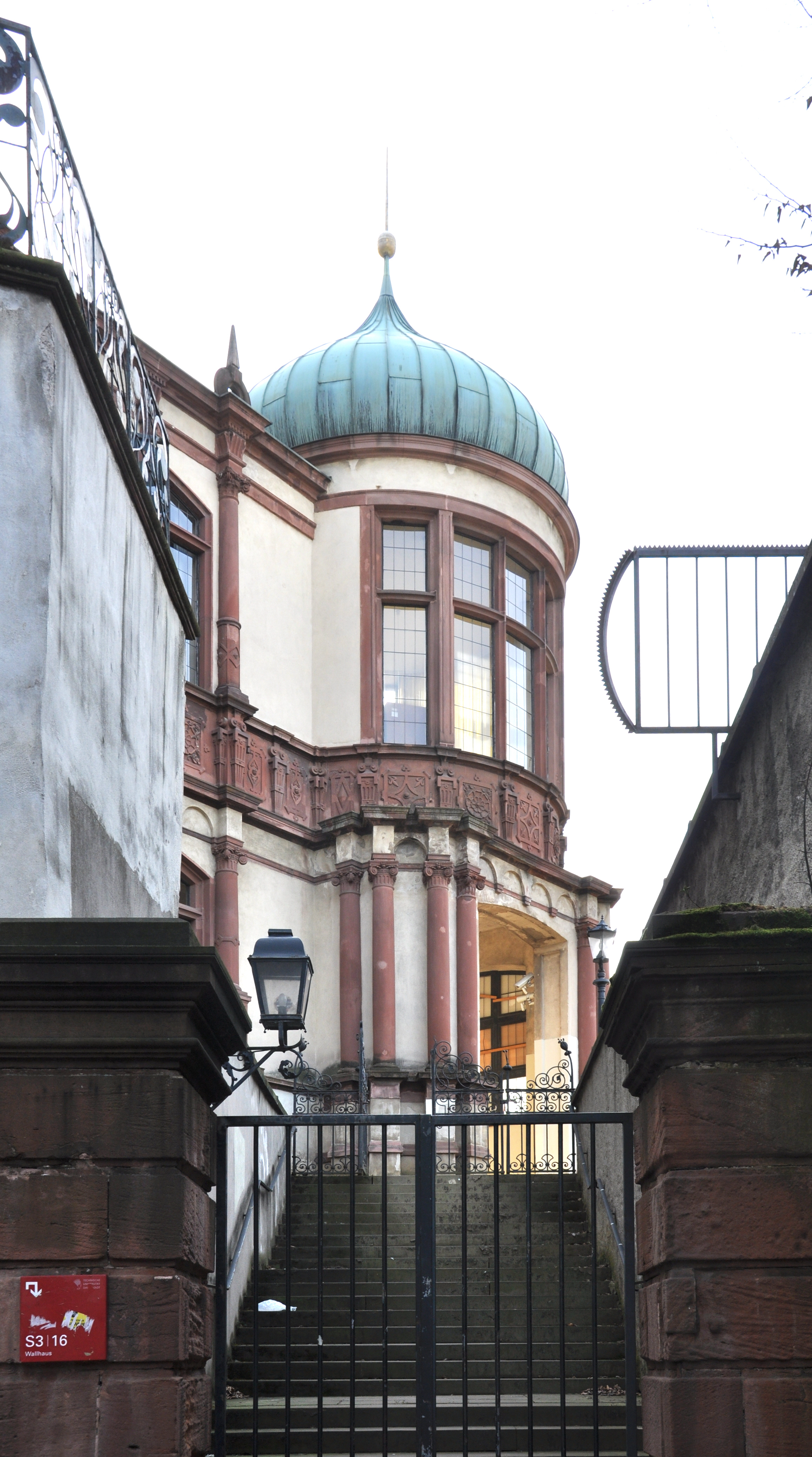 Darmstadt, Residenzschloss, Herrenbau, Eckturm